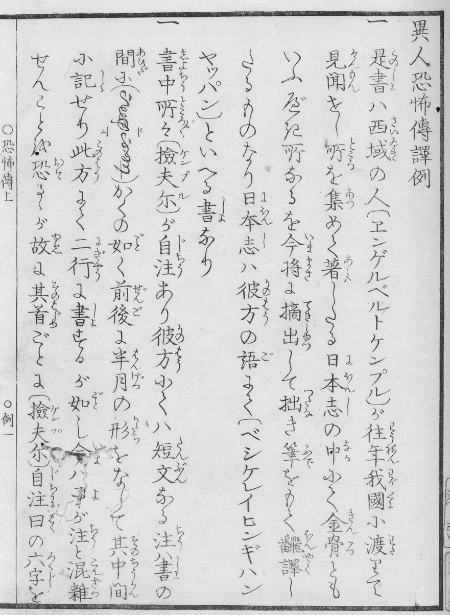 Kurosawa Okinamaro: Ijinkyofuden, S.1. Engelbert Kaempfers Aufsatz zur japanischen Abschlusspolitik in japanischer Übersetzung. Übersetzer: Shizuki Tadao. Die von Kurosawa besorgte Druckausgabe wurde unmittelbar nach ihrem Erscheinen von der Tokugawa-Regierung verboten.